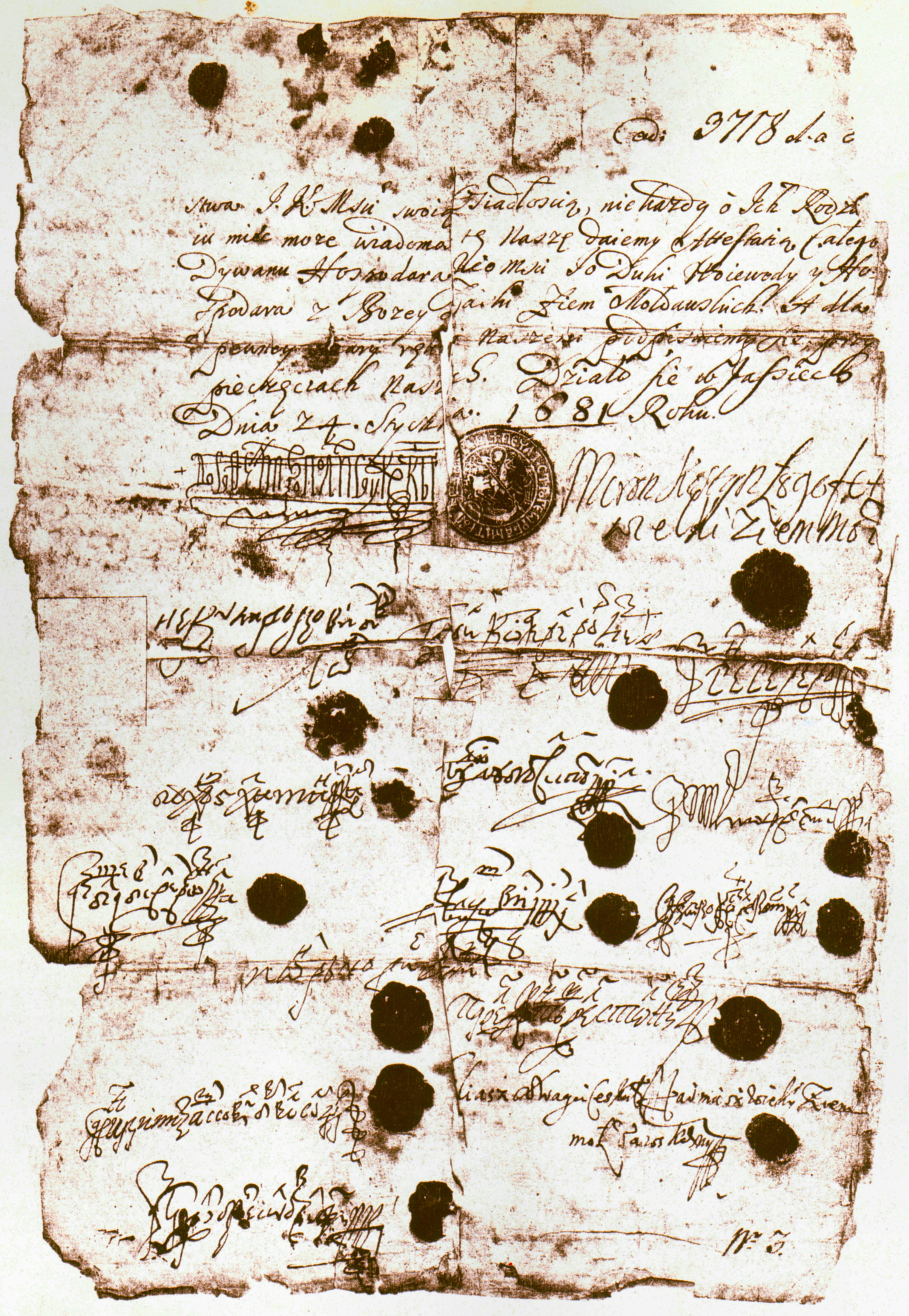 Urkunde vom 24. Januar 1681 - 2, Unterschriften und Siegel